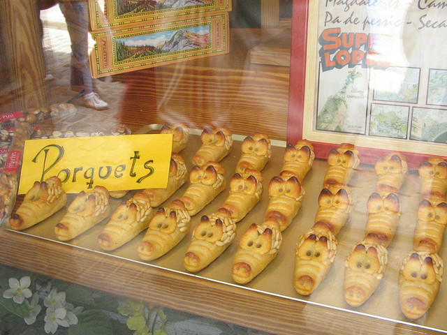 FORN SANT ROC. Los cerditos de camprodon siguen ahí, y como podéis ver el comic de Superlopez sigue funcionando como reclamo.